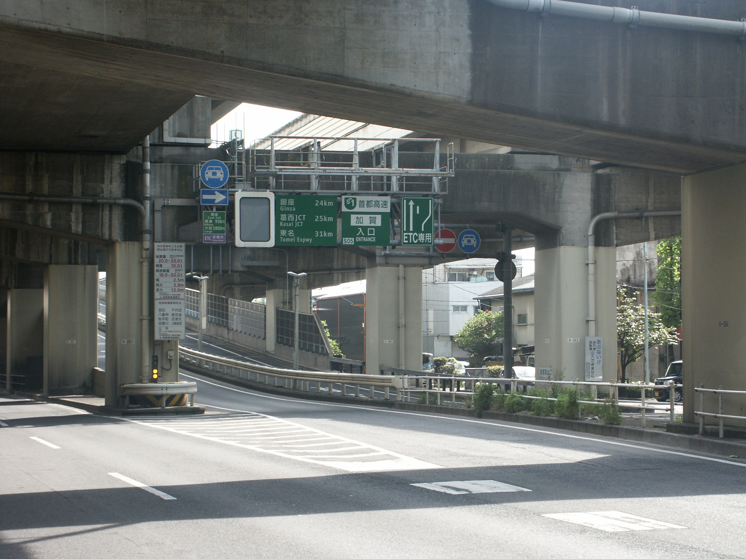 首都高速道路川口線加賀入口（一般道との接続部付近）